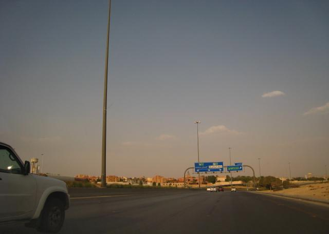 Wide